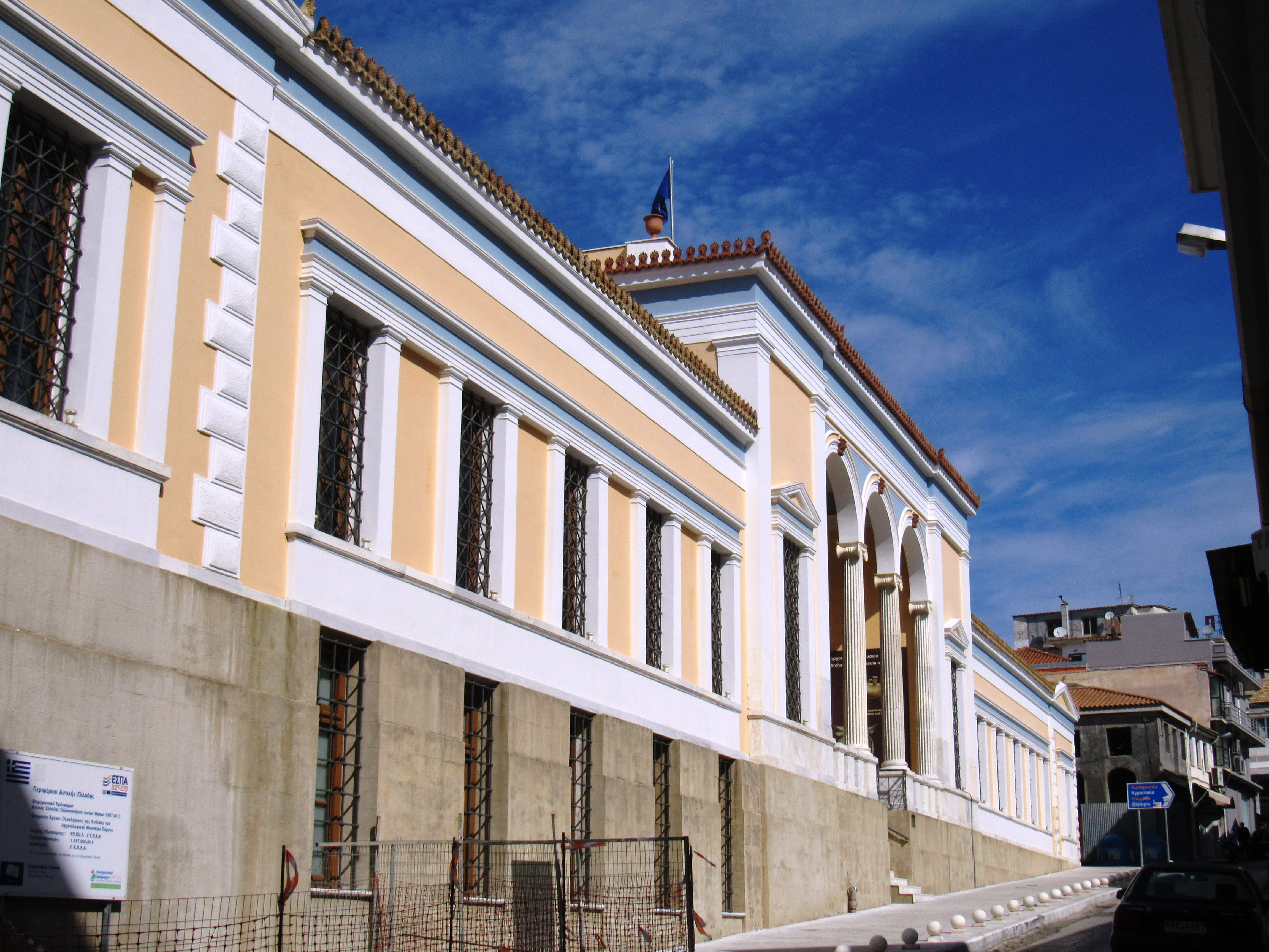 «Δημοτική Αγορά Πύργου Ηλείας»